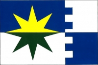 Březina (RO), vlajka. List tvoří dva vodorovné pruhy, modrý a bílý, a vlající zubatý bílo-modře dělený pruh široký třetinu délky listu s pěti čtvercovými zuby a čtyřmi stejnými mezerami. V žerďové a střední části listu žluto-zeleně dělená osmicípá hvězda velká třináct patnáctin šířky listu. Poměr šířky k délce listu je 2 : 3.